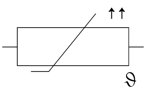 Beschreibung: Schaltzeichen eines PTC-Widerstandes Autor: Dorfjung Datum: 13. Juli 2006 Lizenz: GFDL